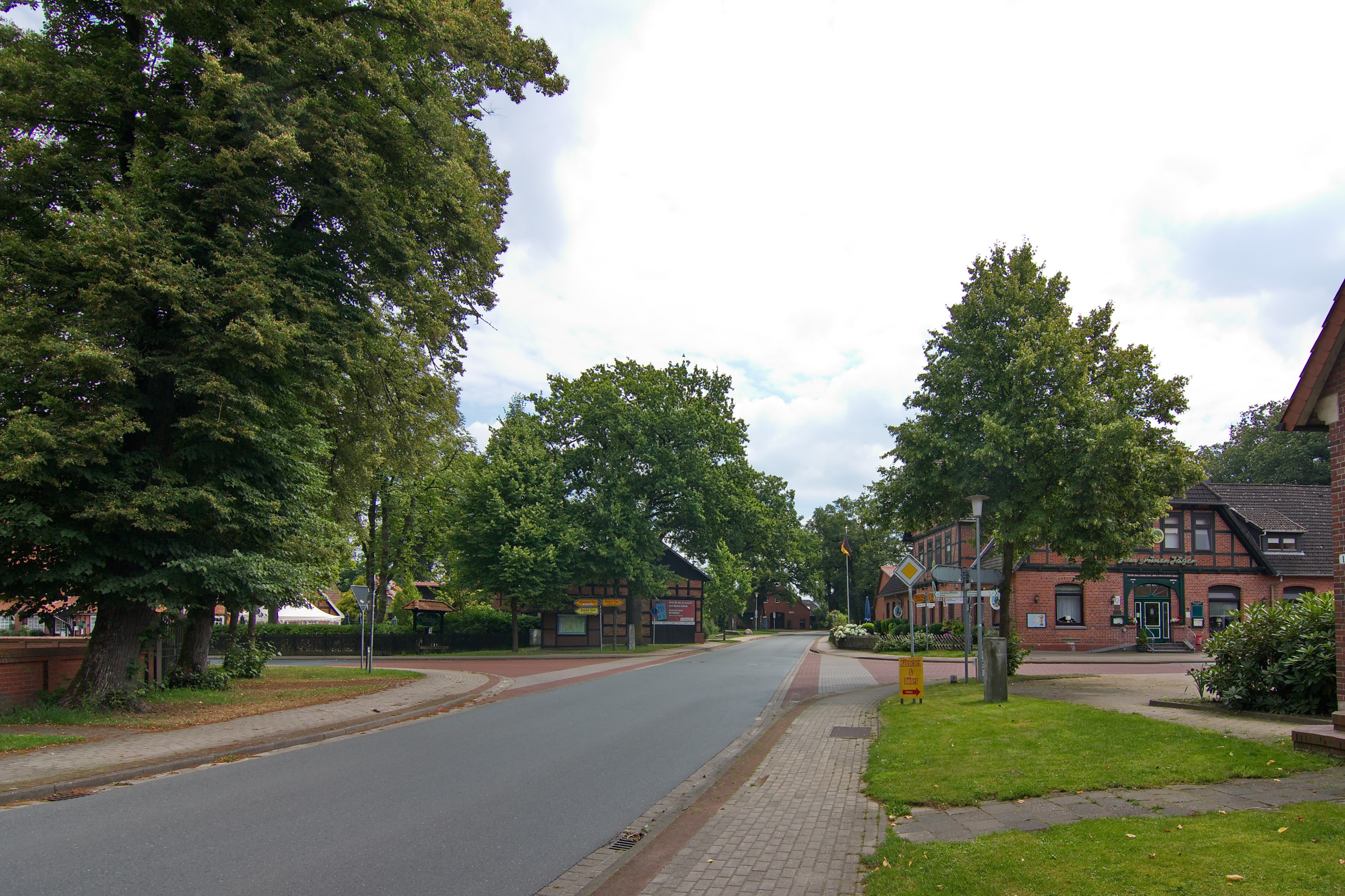 Ortsbild in Kirchwalsede, Niedersachsen, Deutschland